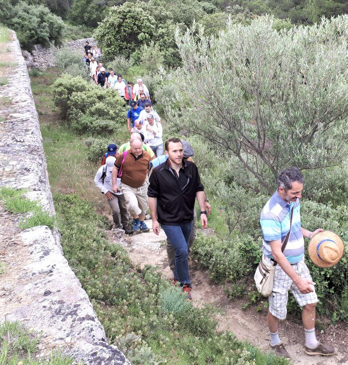 Jean-Marc Zulesi lors de la montée du Talagard le 26 mai 2018.